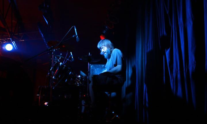 Bildē redzams Imants Vovers pie bungām, koncerta laikā.